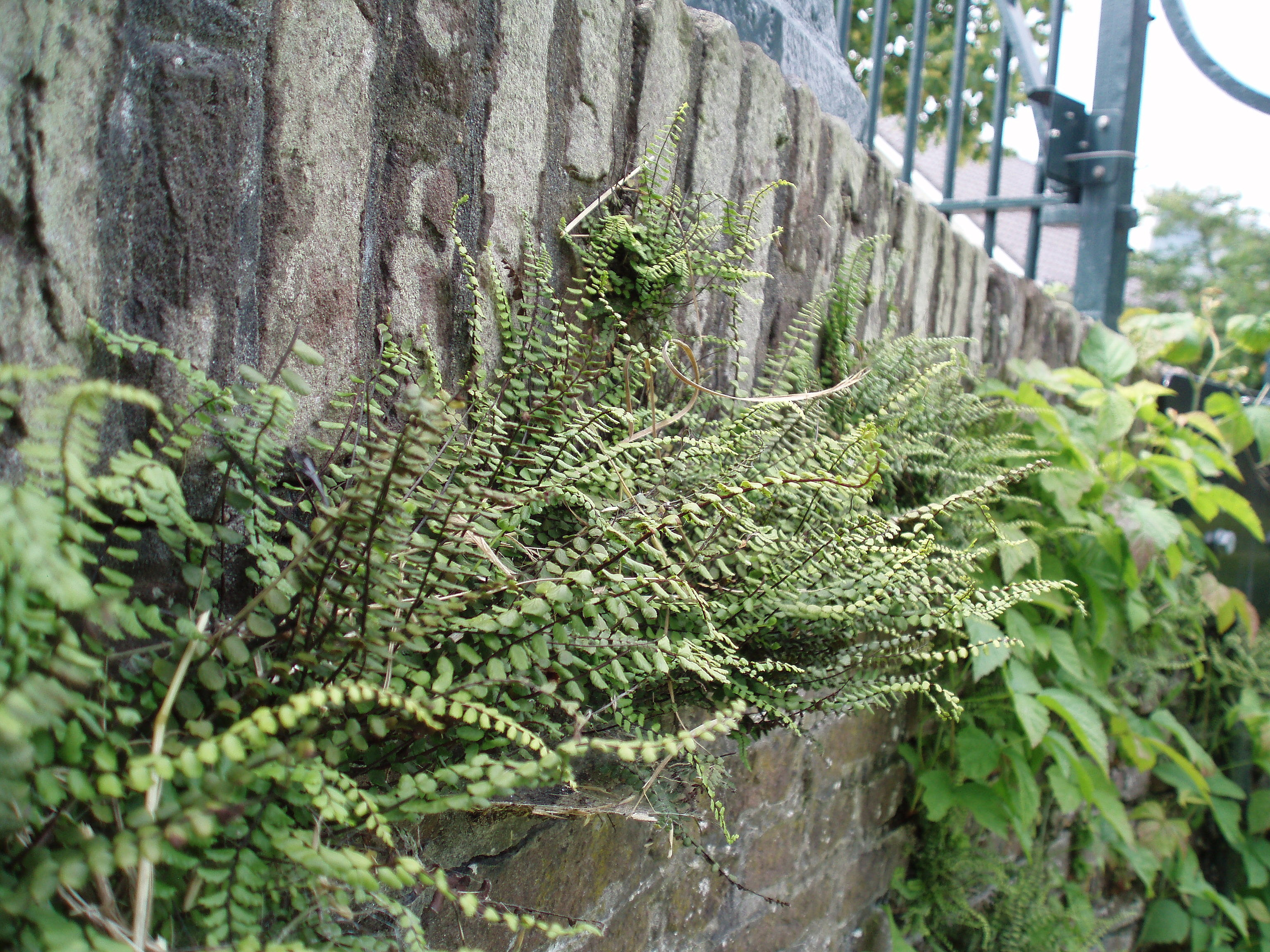 Steenbreekvaren (Asplenium trichomanes) in 's-Gravensloot in de gemeente Woerden.